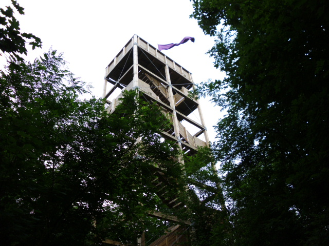 Aussichtsturm